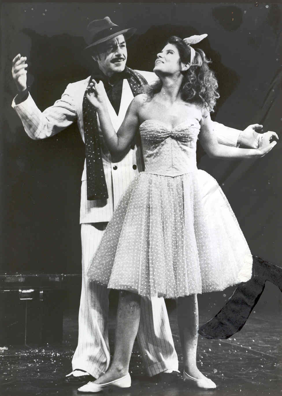 לימור שפירא ויצחק חזקיה במחזמר פנטסטי.